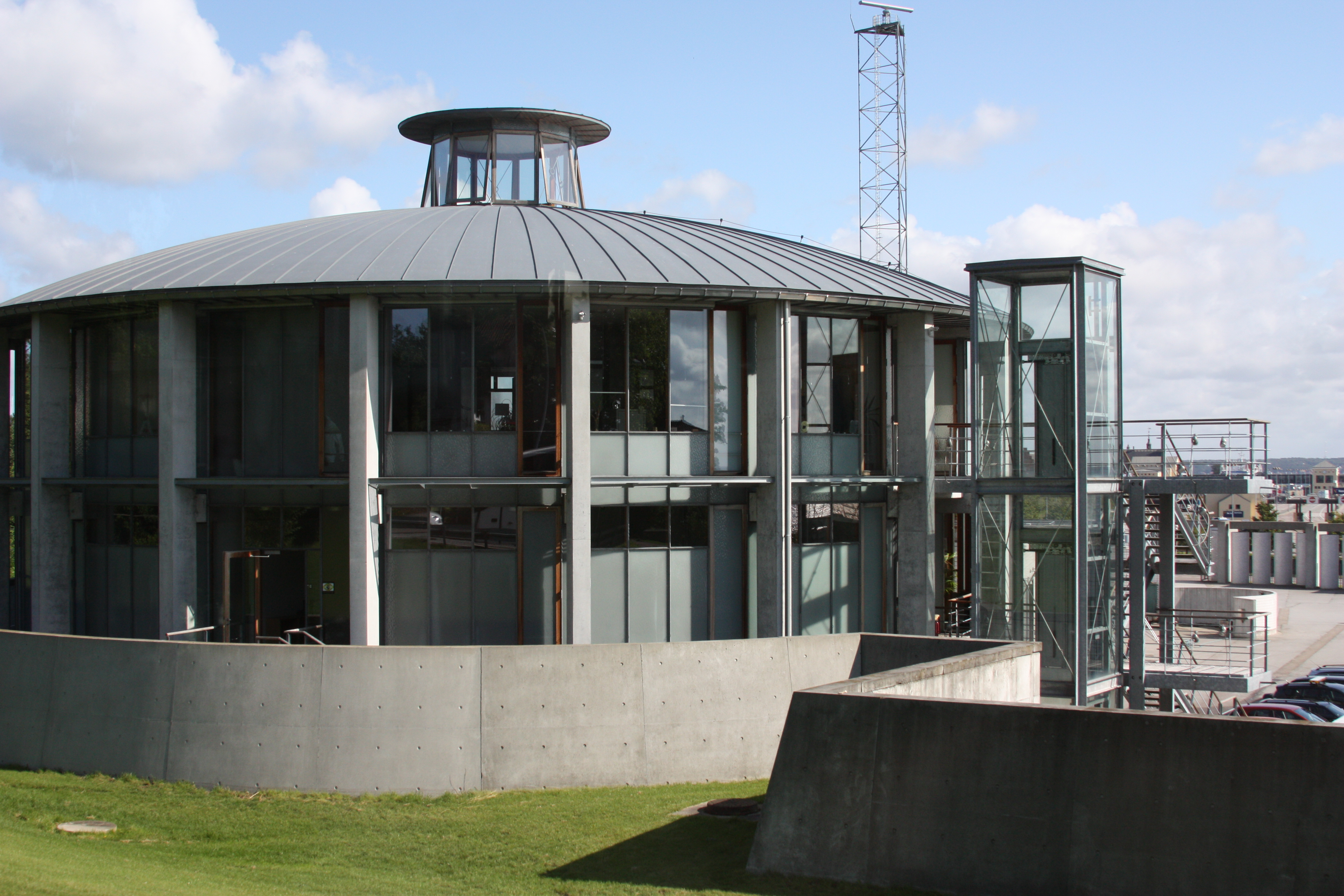 August 2009